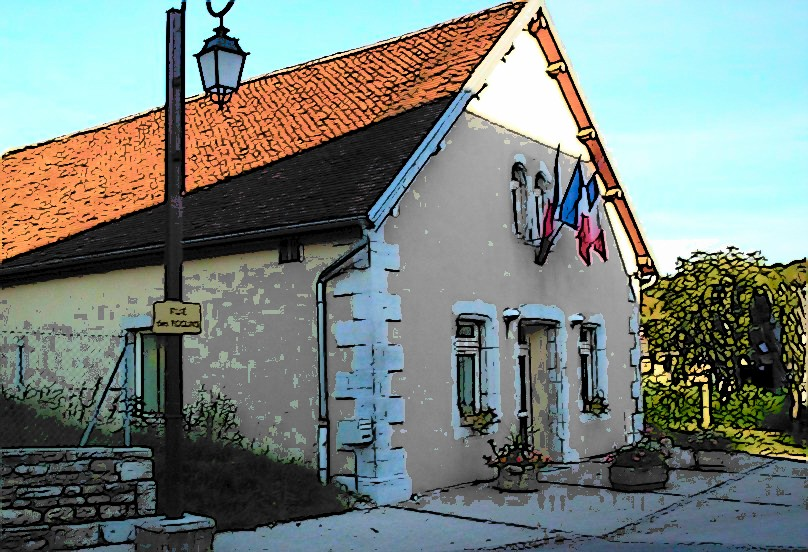 mairie de Fontenu (39)